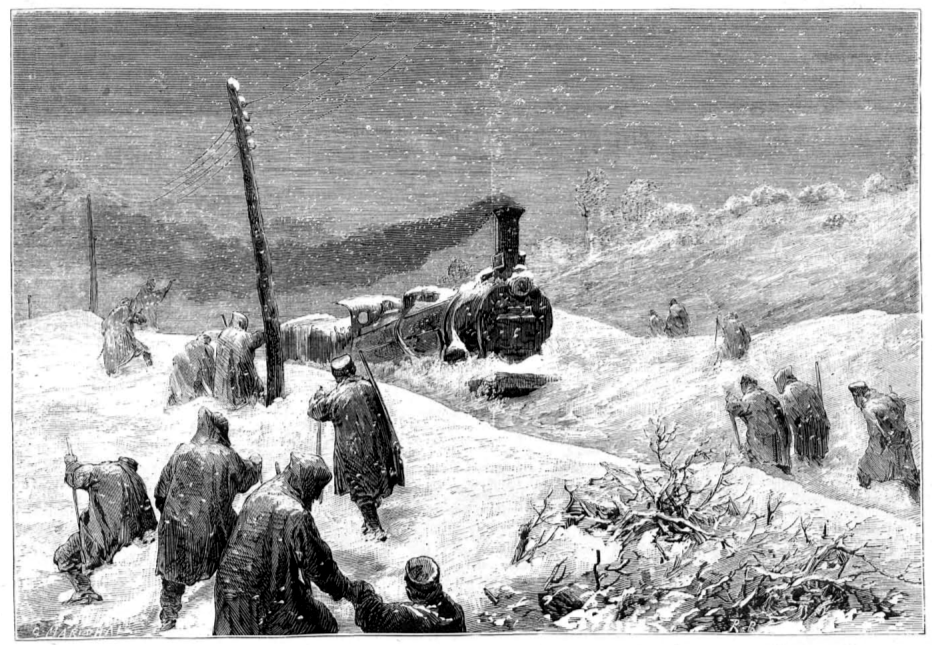 El 13 de diciembre de 1864 el tren de viajeros de la Compañía del Norte proveniente de Madrid hacia Santander estuvo sepultado por la nieve durante 15 días, teniendo que ser los pasajeros rescatados por un destacamento de carabineros que lograron acceder desde la estación de Pozazal (Cantabria, España). Xilografía procedente de "La Ilustración Española y Americana" bajo el título: "Tren detenido por nieves: carabineros al mando del oficial Osios acuden a prestar auxilio a los viajeros".